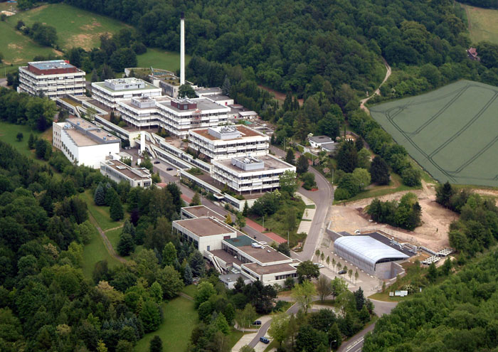 Luftbildaufnahme des Max-Planck-Instituts für biophysikalische Chemie